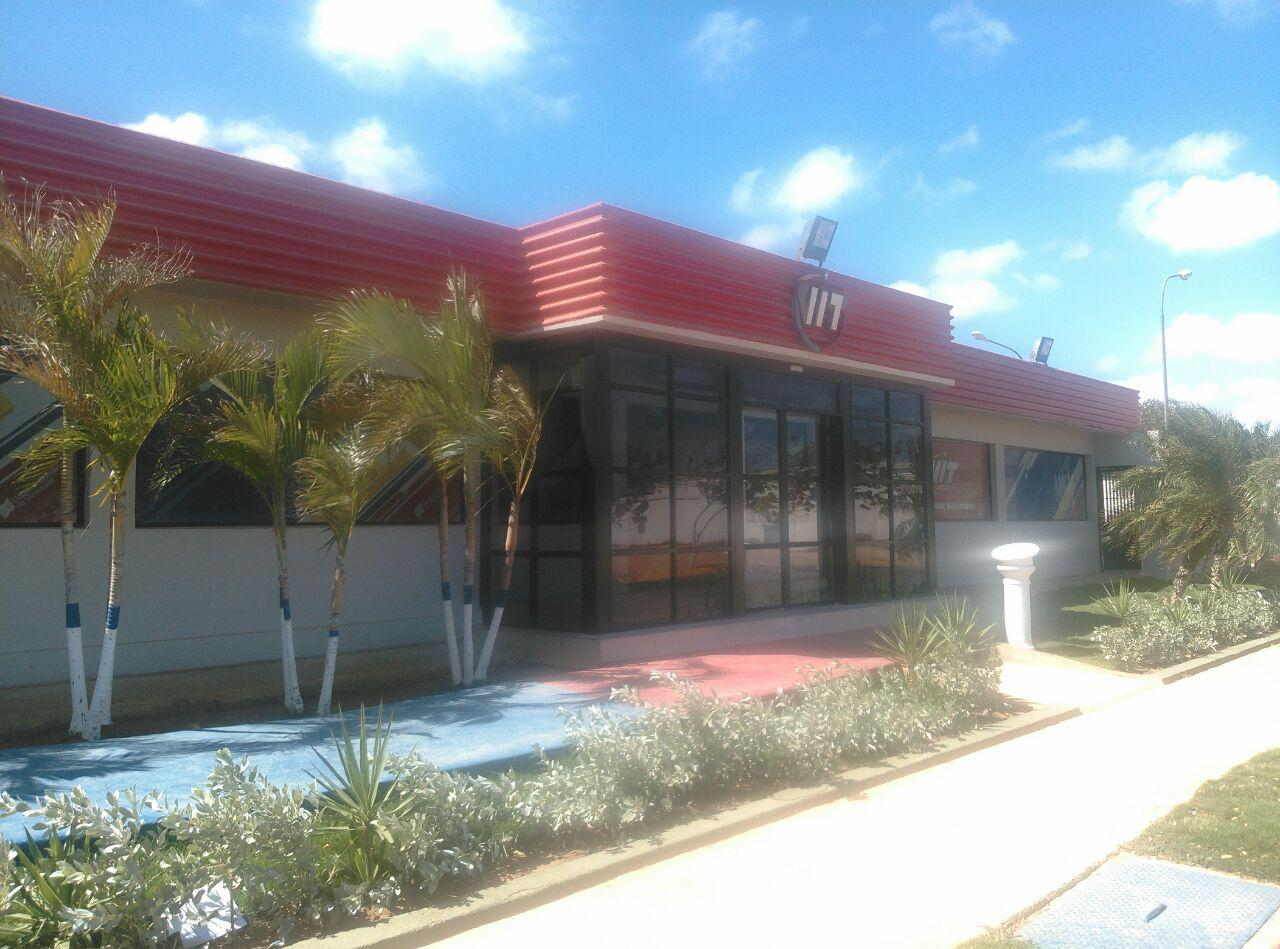 Entrada Principal de VIT